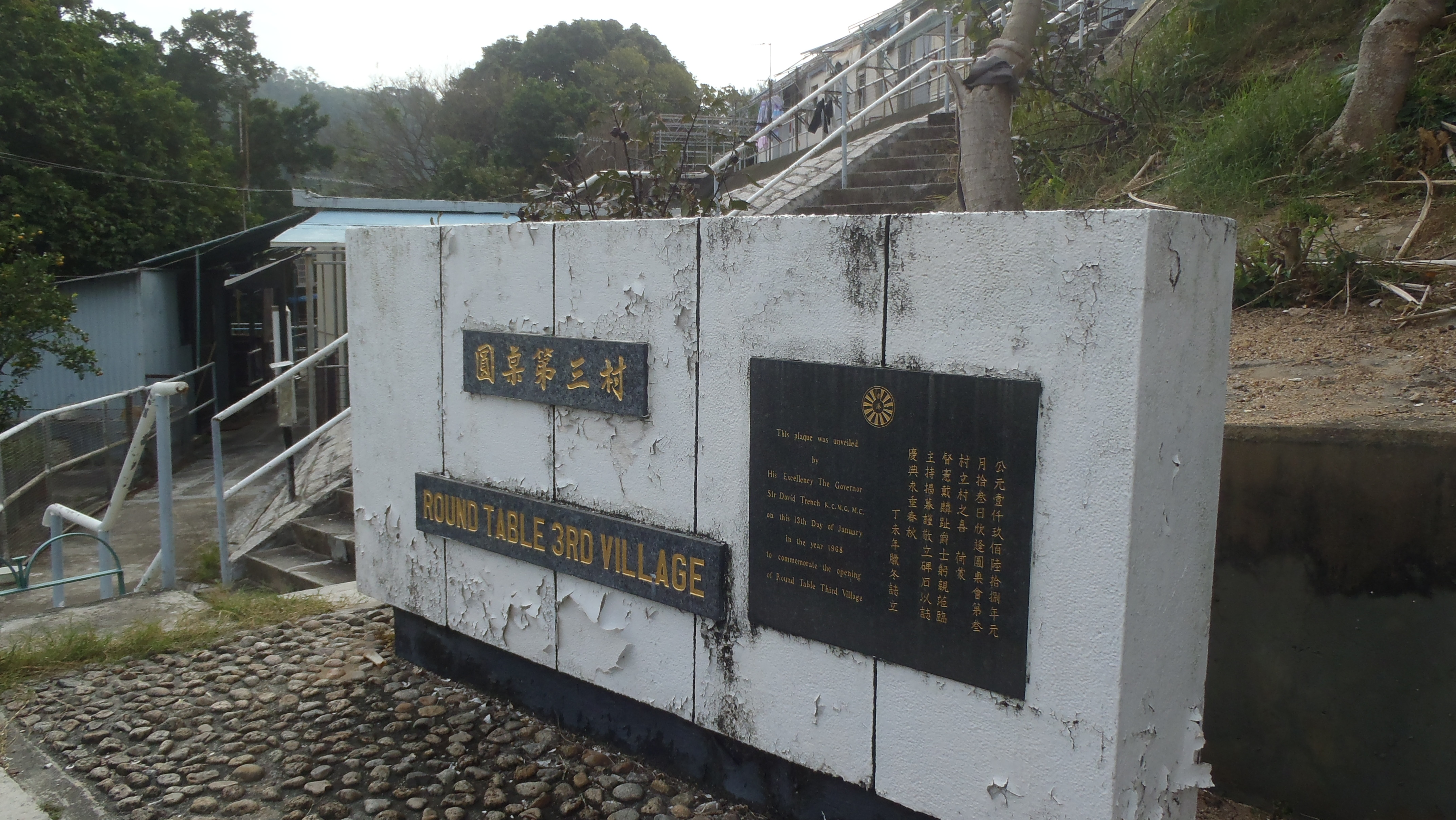 中文（香港）: 圓桌三村_落成紀念碑